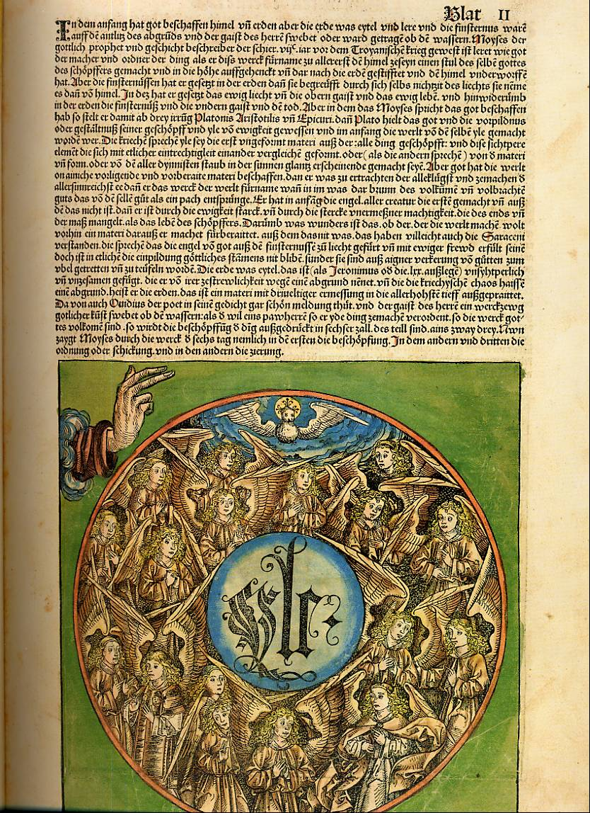 Schedel'sche Weltchronik